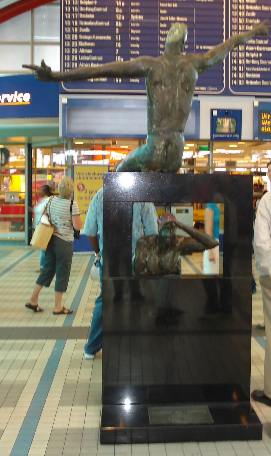 Utrecht, Centraal station. Kunstwerk "l'incontra" van Wim Steins. Utrecht/The Netherlands.